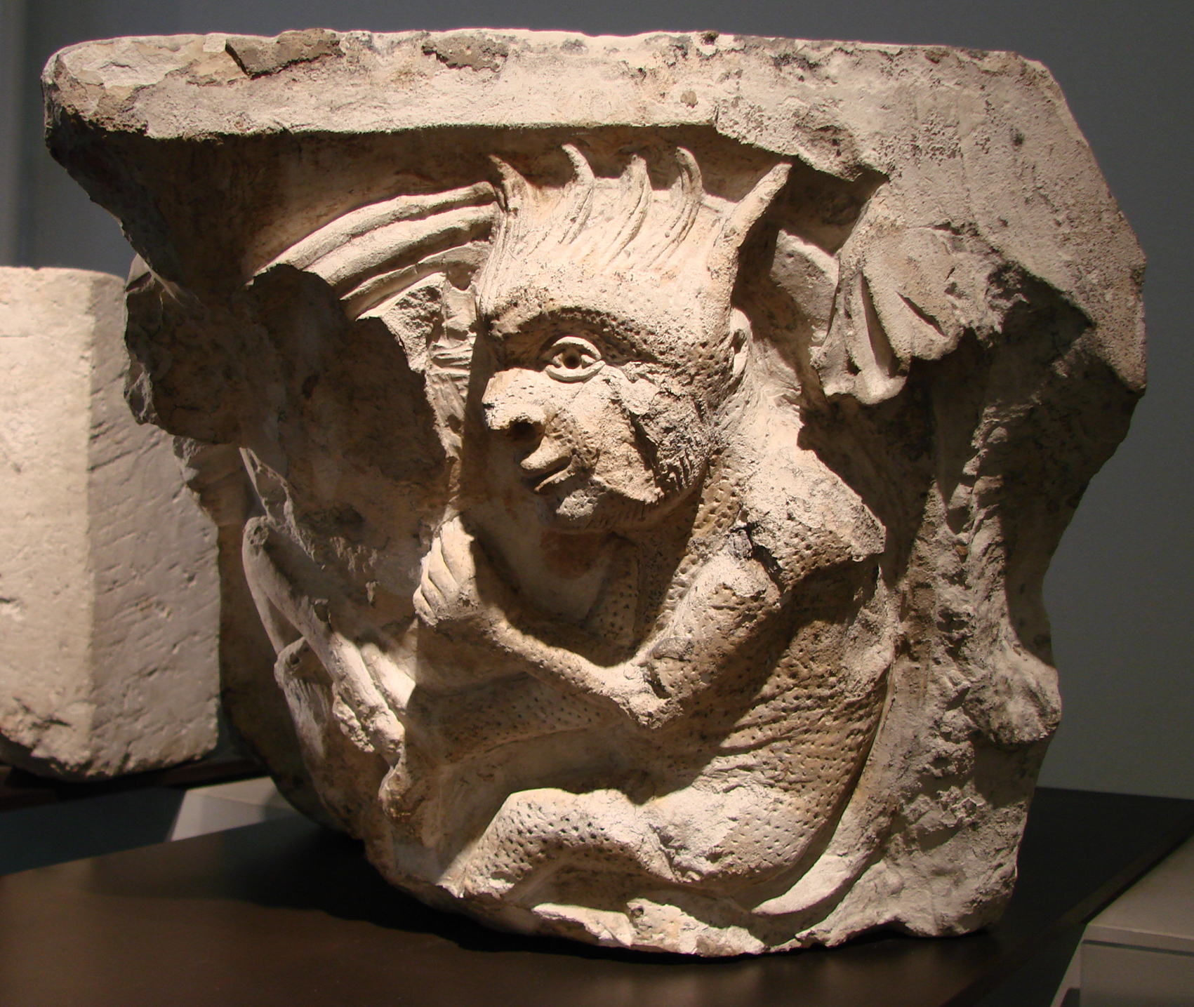 Chapiteau d'angle orné de diables.Provient de l'ancienne abbaye de Saint-Martin-aux-Jumeaux à Amiens. 12ème siècle. Musée de Picardie à Amiens.